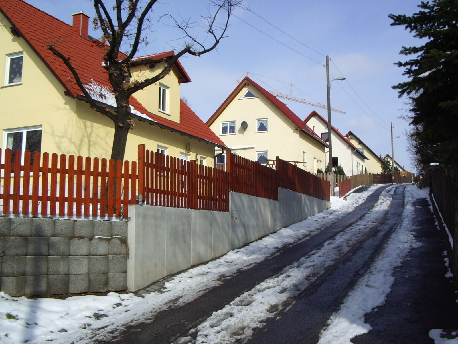 Das Foto zeigt neue Einfamilienhäuser am Dörnichtweg in 01109 Dresden - Klotzsche